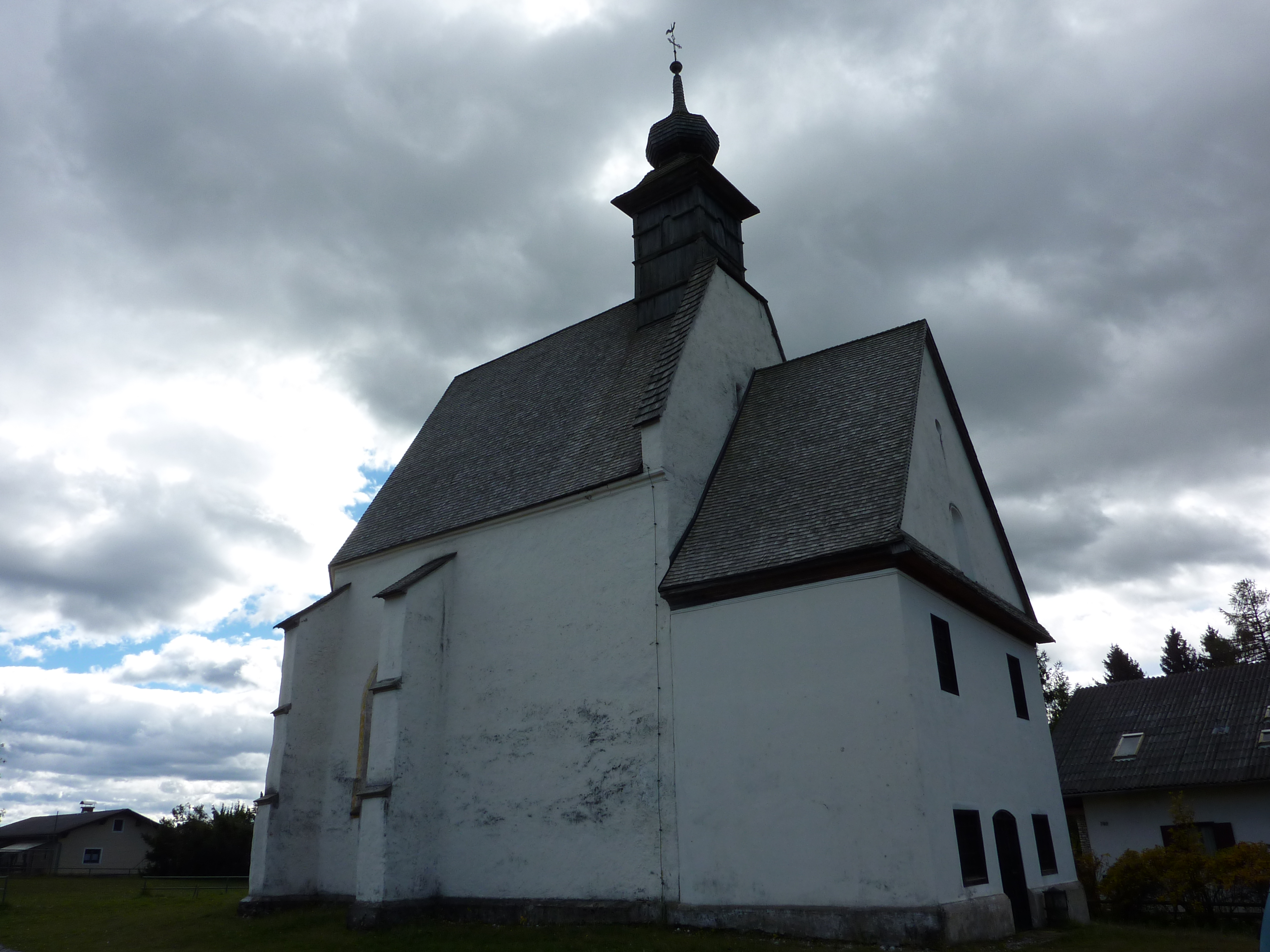 Filialkirche hl. Hemma, Sankt Hemma, Edelschrott, Steiermark